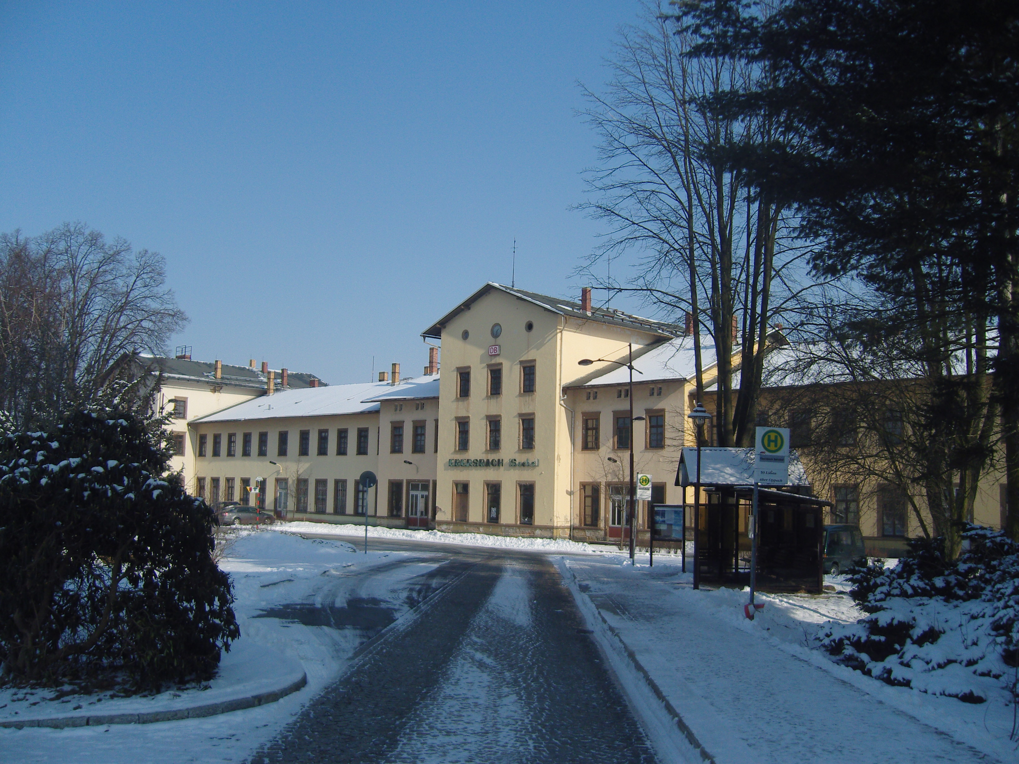 Bahnhof Ebersbach/Sa.